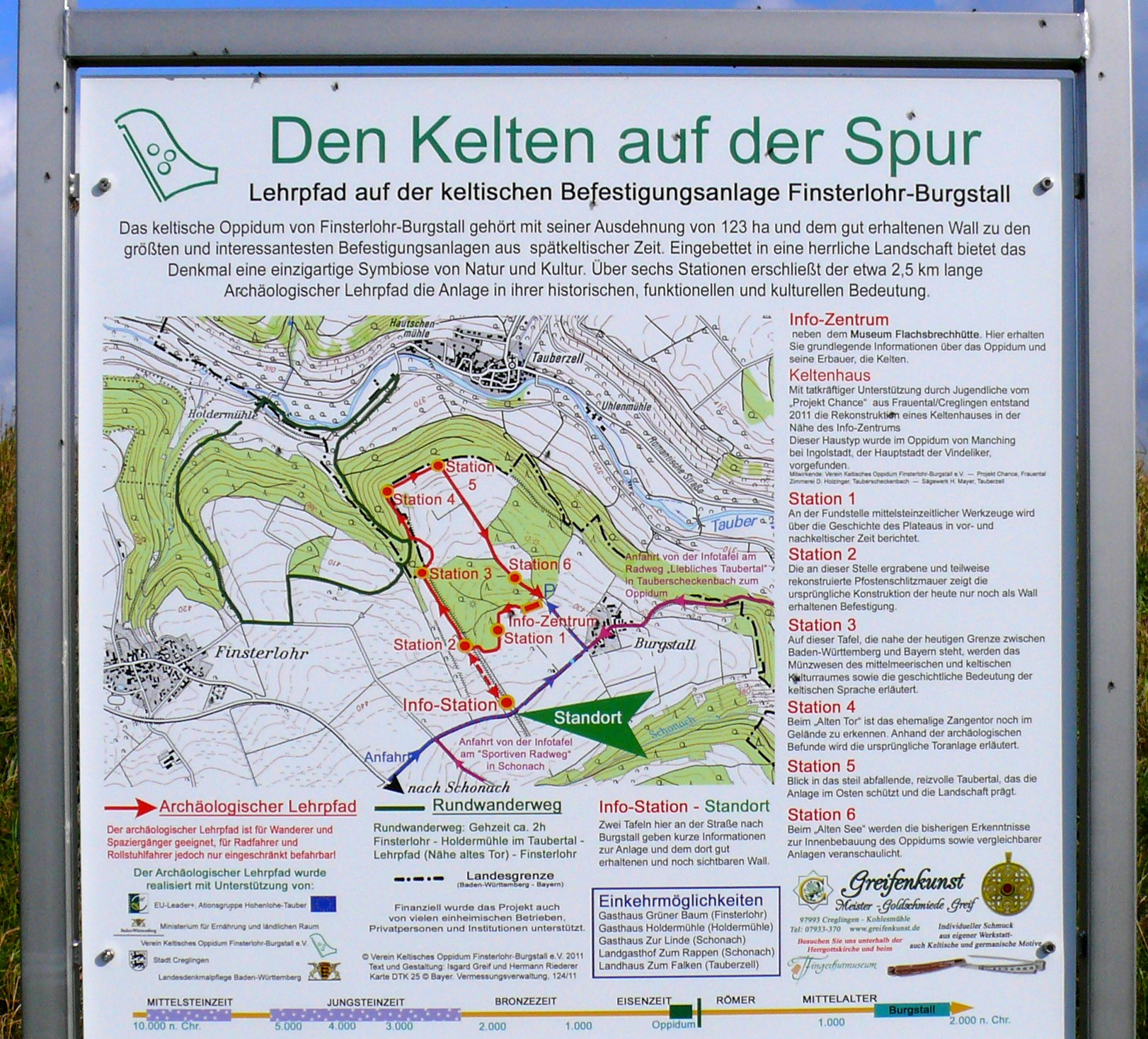 Infotafel am Keltenwall (Oppidum) Creglingen-Finsterlohr-Burgstall